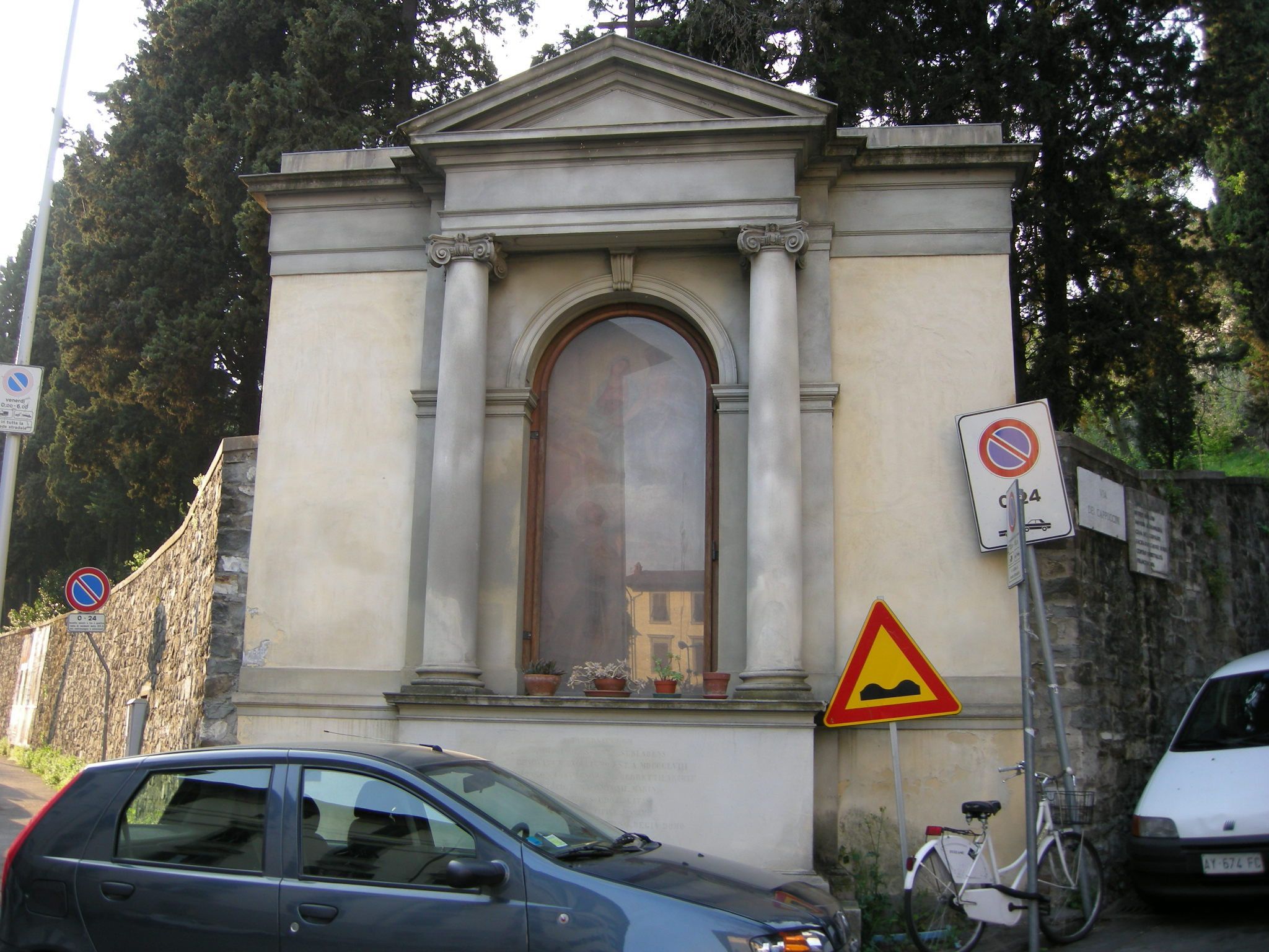 Tabernacolo dei cappuccini, fi 01